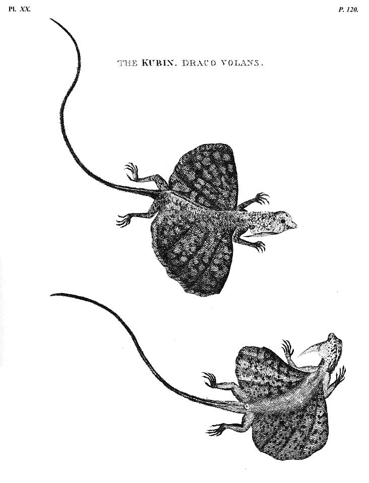 William Marsden: The History of Sumatra. Tafel XX: The Kubin